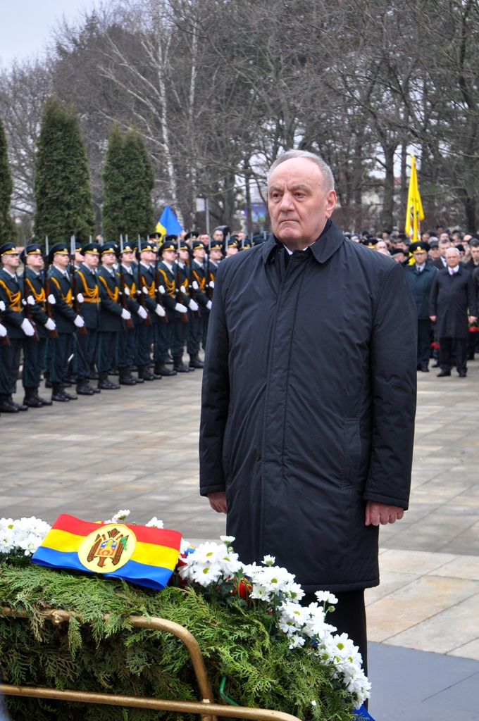 Nicolae Timofti in 2015